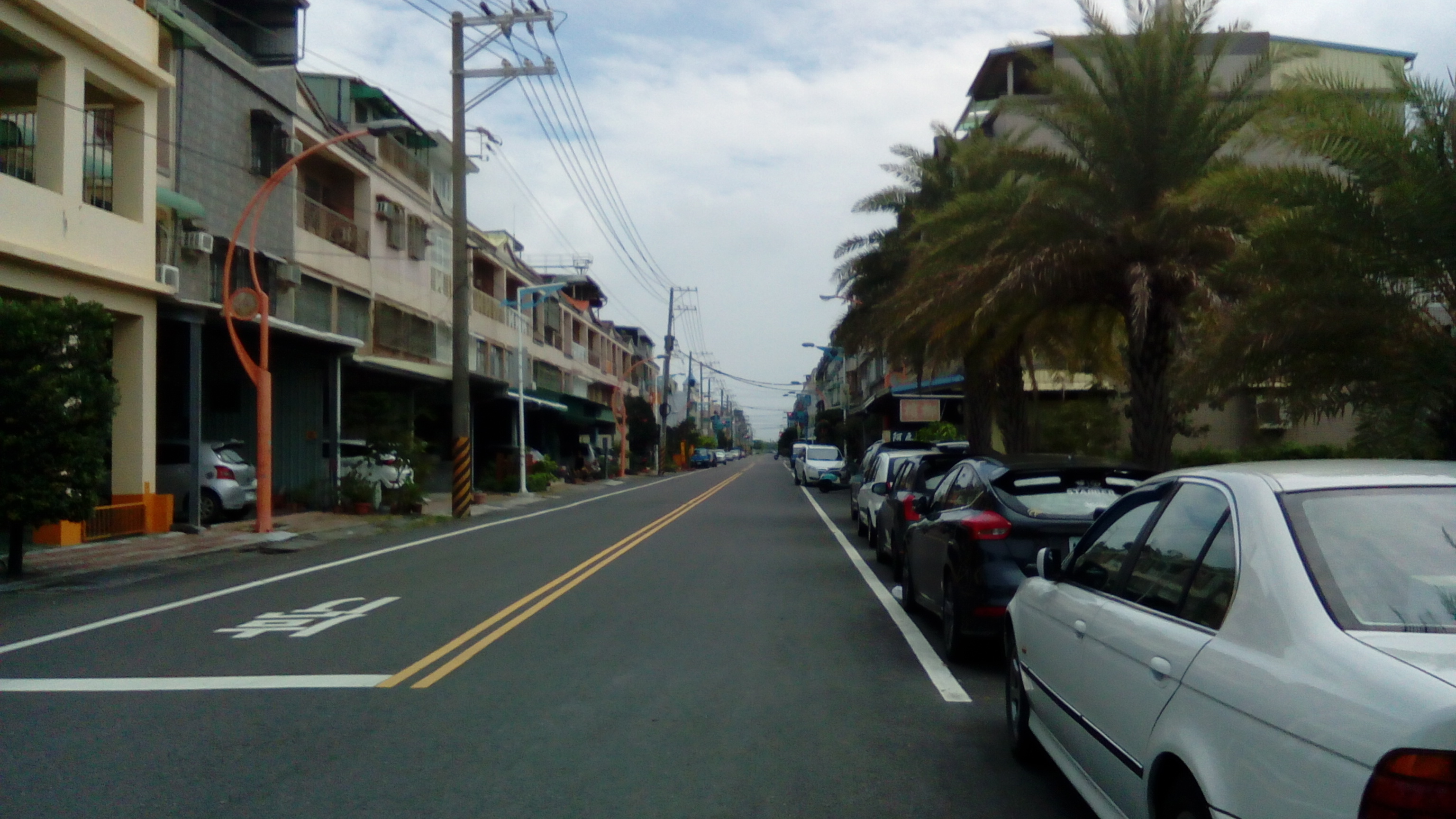 高雄市梓官區蚵仔寮通港路